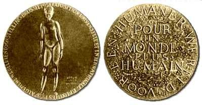 Grand Prix Brussel 1958